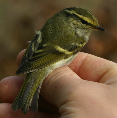 Királyfüzike gyűrűzés után (Tömörd)